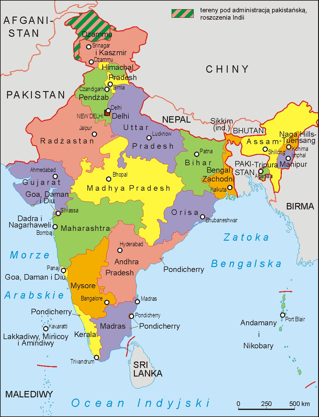 Podział administracyjny Indii w 1961 roku. Autor Aotearoa